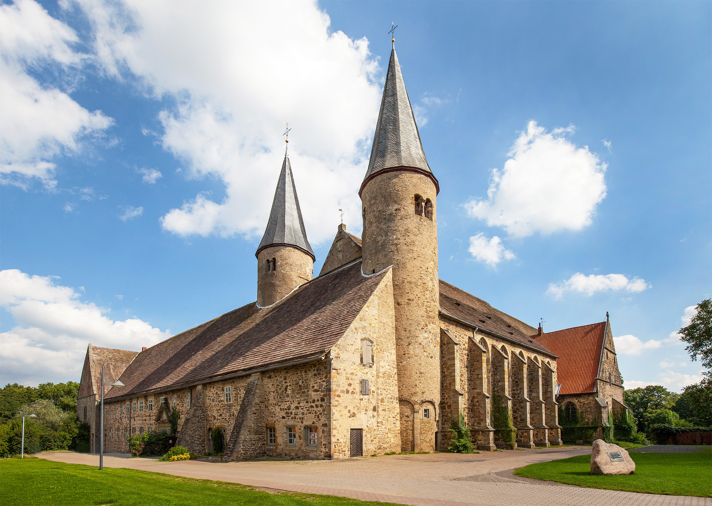 Das ehemalige Kloster Möllenbeck in Möllenbeck, Stadt Rinteln, Landkreis Schaumburg, Niedersachsen. This is a photograph of an architectural monument.It is on the list of cultural monuments of Rinteln